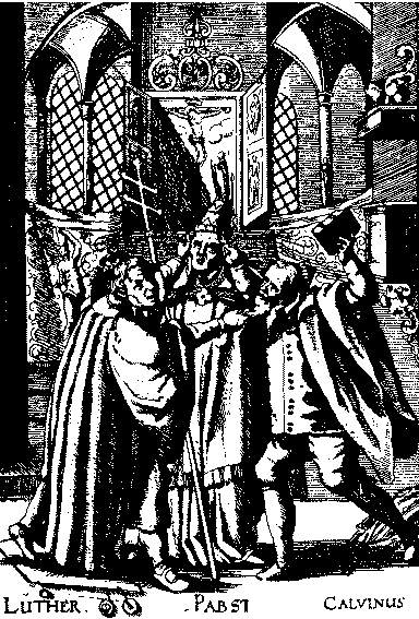 Flugblatt von 1620. Satirische Darstellung von Papst, Luther und Calvin im Streit.